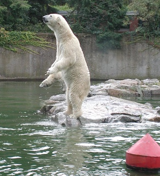 Tomada en el zoo de Berlín